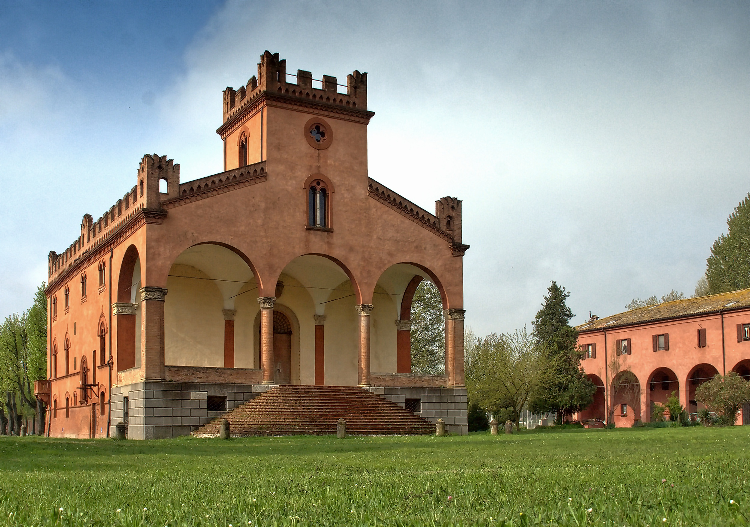 Villa Rusconi, Mezzolara di Budrio This is a photo of a monument which is part of cultural heritage of Italy.